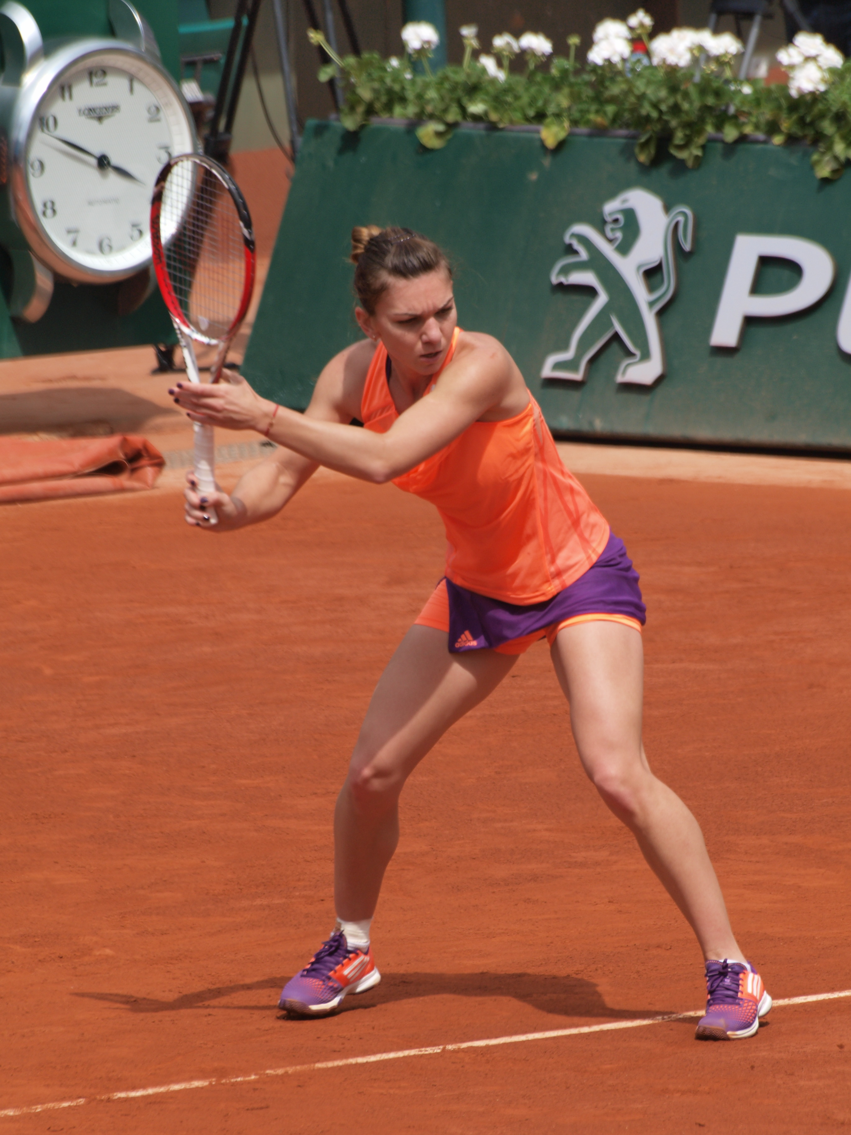 Internationaux de France de tennis, le 2 juin 2014, sur le court Philippe Chatrier : Simona Halep